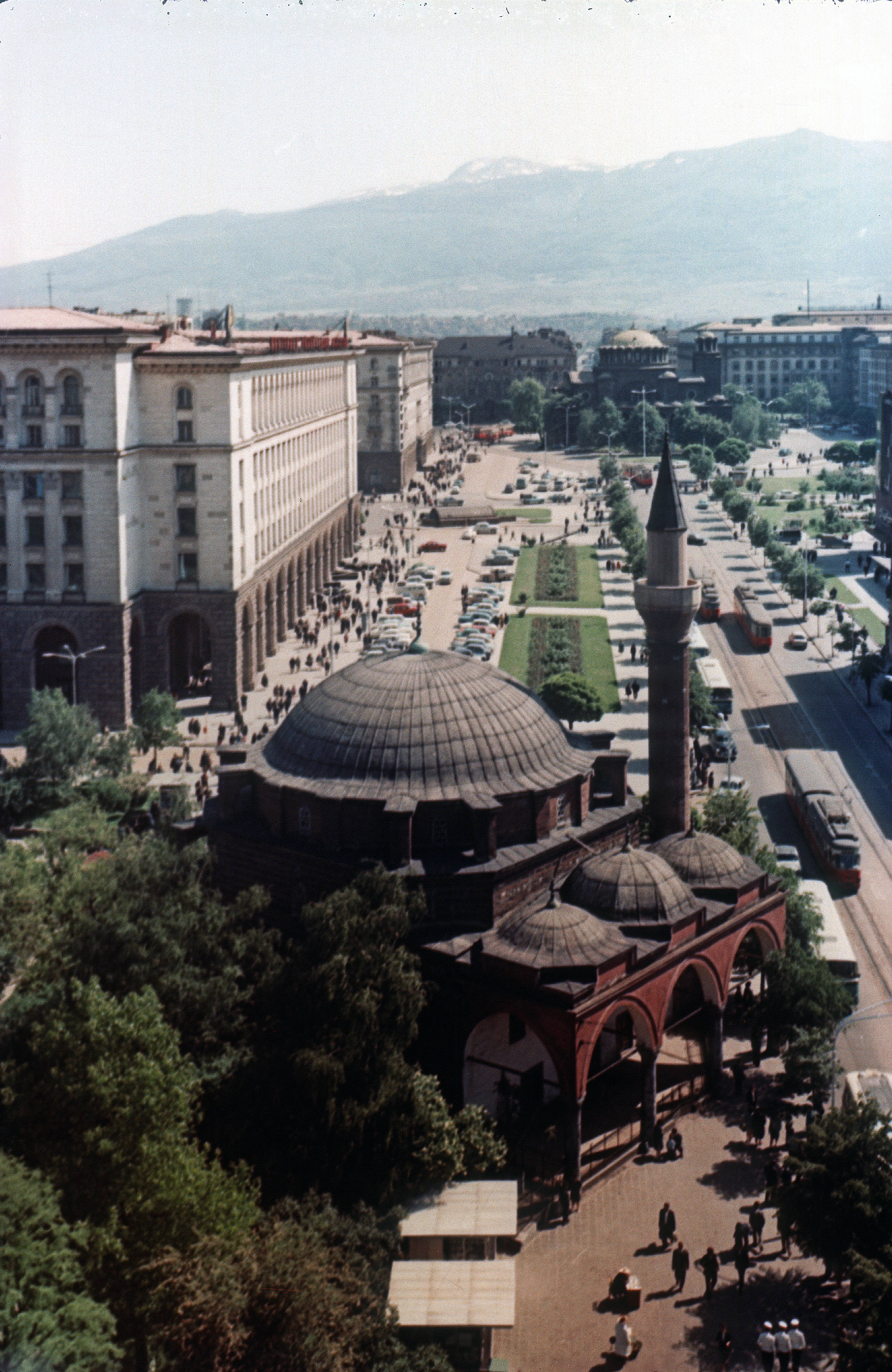 Bulgarien um 1970; Sofia Zentrum; Banja Baschi Mosche und Kirche Sweta Sifua, Witoscha im Hintergrund; Blick nach Süden